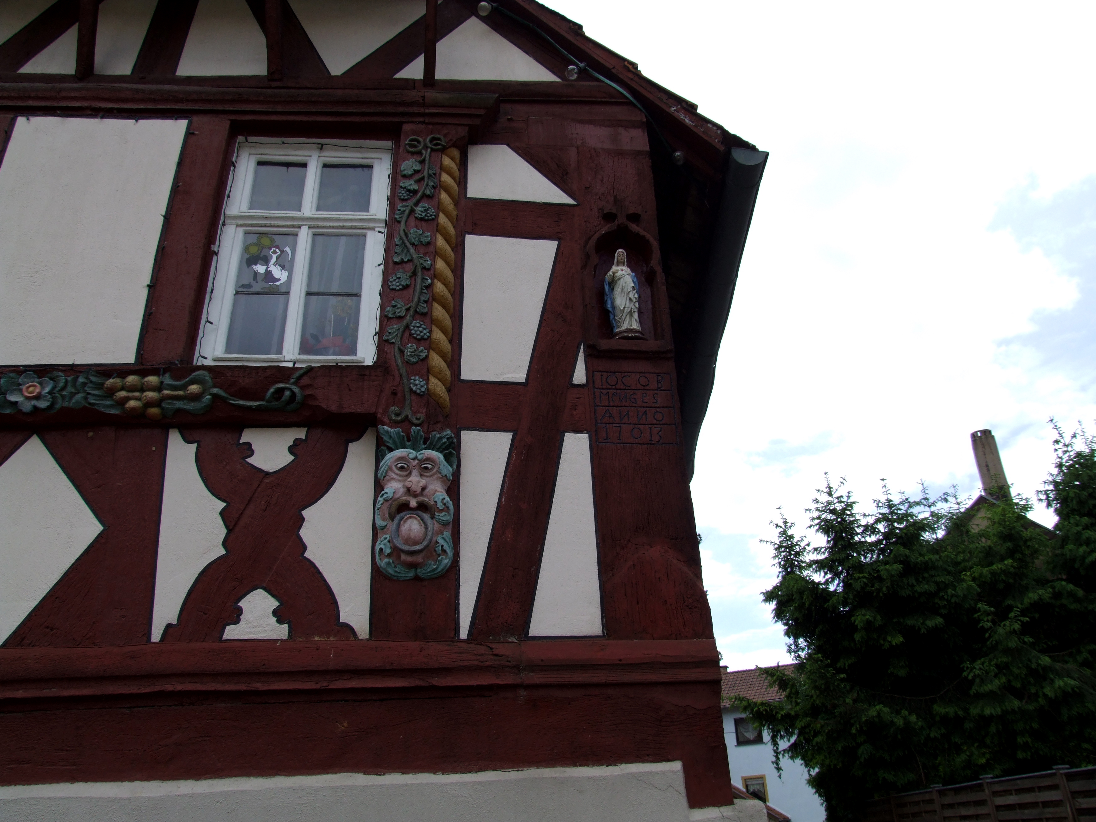 Detail eines Fachwerkhauses von IOCOB MENGES von 1713 in Rauenberg-Rotenberg (Schlossstraße 16) im Kraichgau in Baden-Württemberg, Deutschland